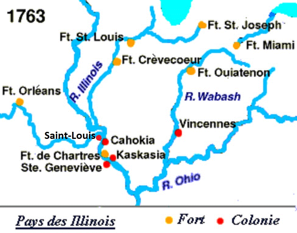 Francisation de la carte du pays des Illinois à l'époque de la Nouvelle-France et de la Louisiane française.